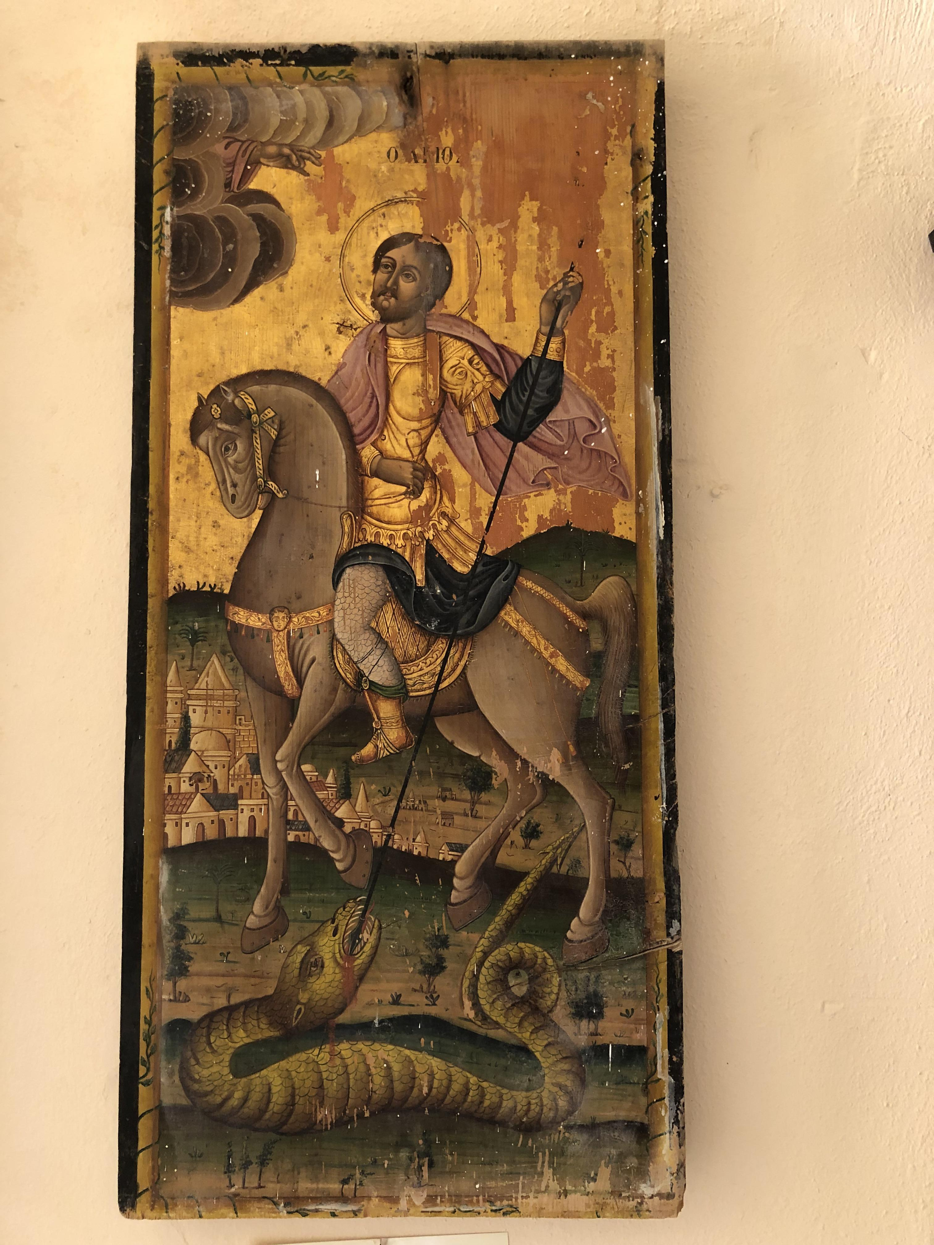 Monastère de Chrysoskalitissa (Innachori, Crète). Icône de Théodore le Tiron (1880).